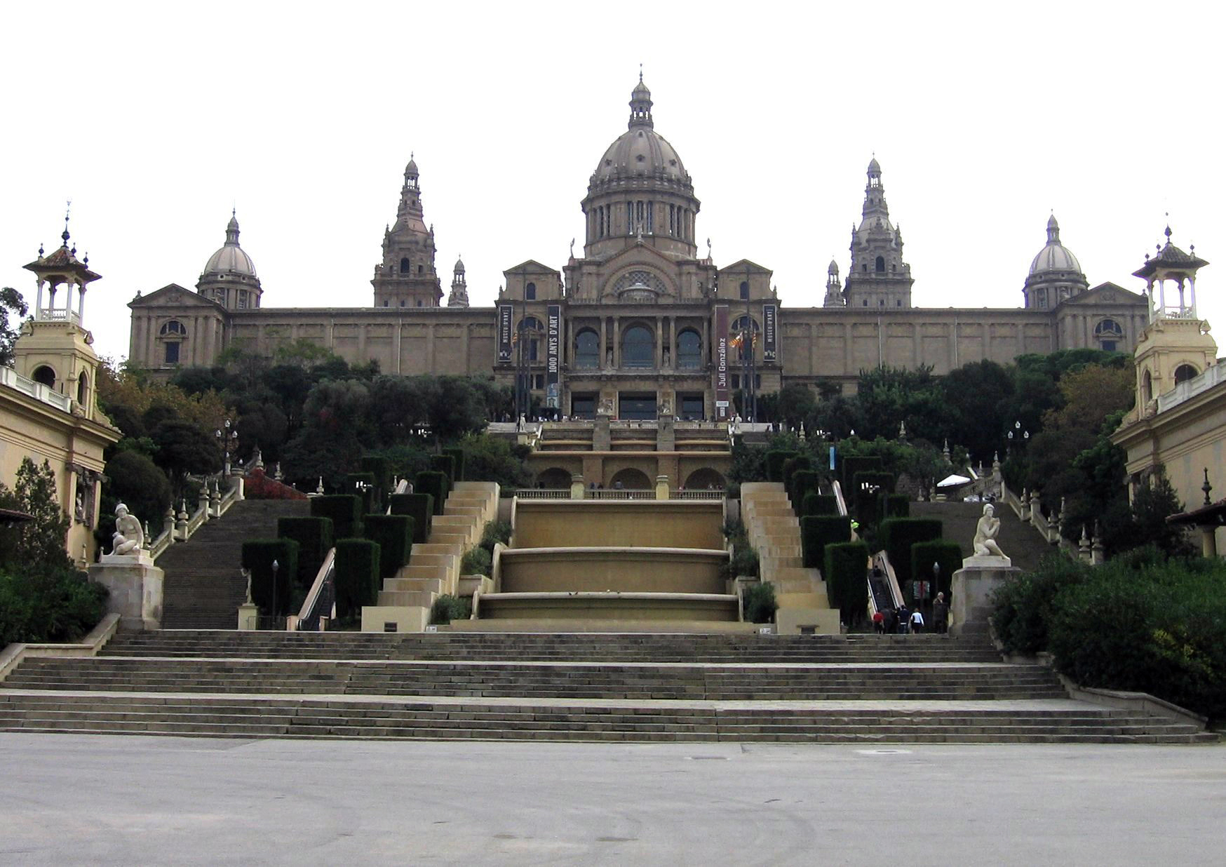 Palacio Nacional, actual Museo Nacional de Arte de Cataluña, Montjuïc (Barcelona)